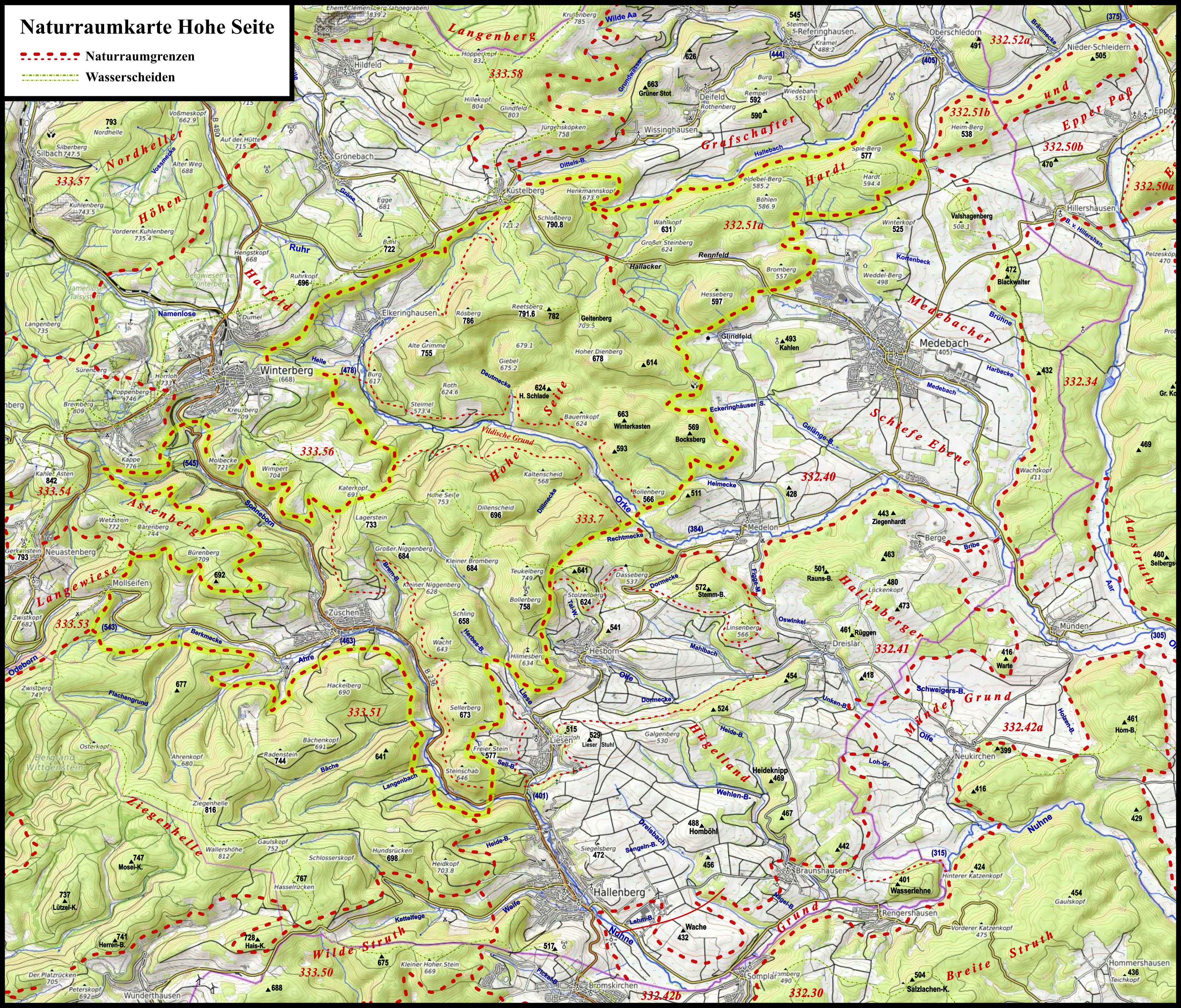 Naturraumkarte des bis 792 m hohen Naturraums Hohe Seite östlich von Winterberg, westlich von Medebach und nördlich von Hallenberg im Rothaargebirge mit Züschen im Südwesten nebst Nachbarnaturräumen; die "Konkurrenzberge" Kahler Asten (842 m, Westen) und Ziegenhelle (816 m, Südwesten) sind im Ausschnitt enthalten, ebenso der Hopperkopf (832 m) im Norden.